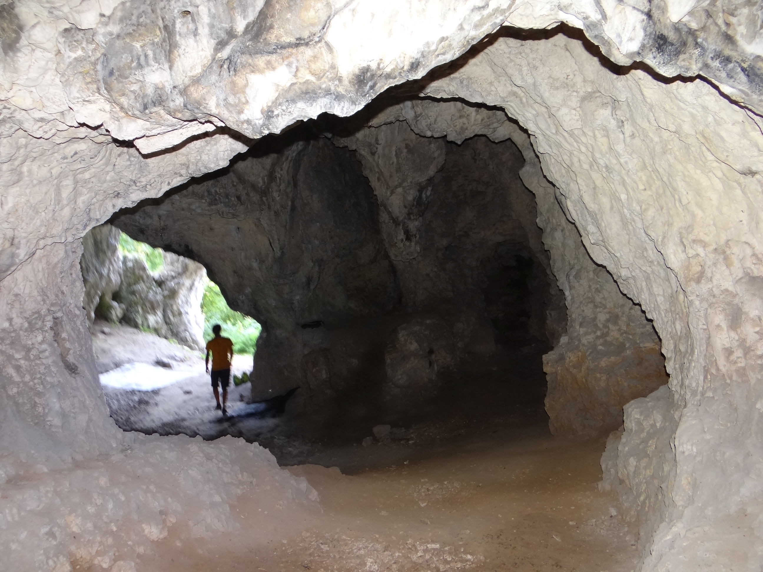 Jaskinia Mamutowa w Wierzchowiu